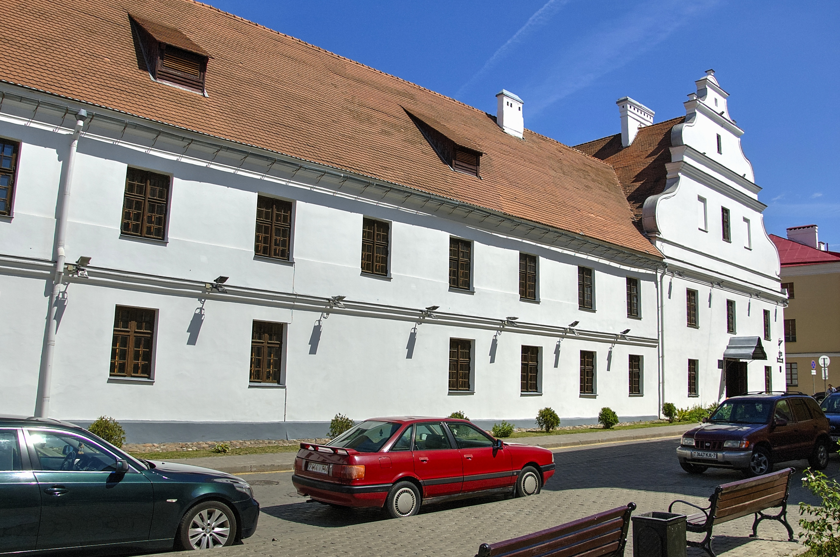 Беларуская (тарашкевіца): Сьвята-Духаўскі манастыр базылянак (Менск)